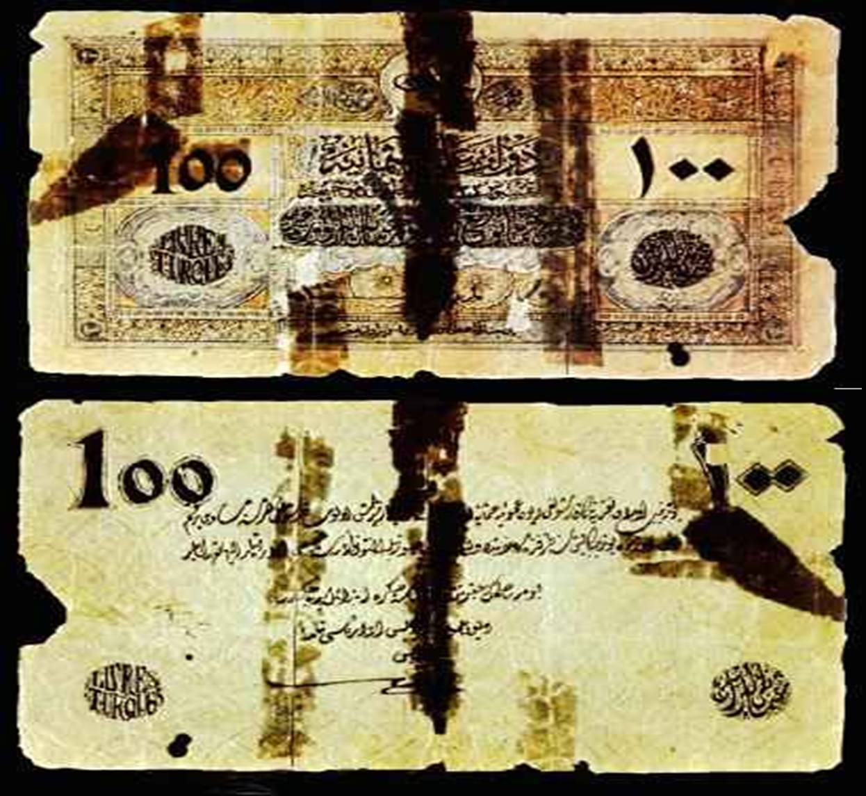 Çanakkale savaşı sonunda lastik temini için Yahudi tüccara verilmek üzere Mehmet Muzaffer'in hazırladığı sahte 100'lük banknot